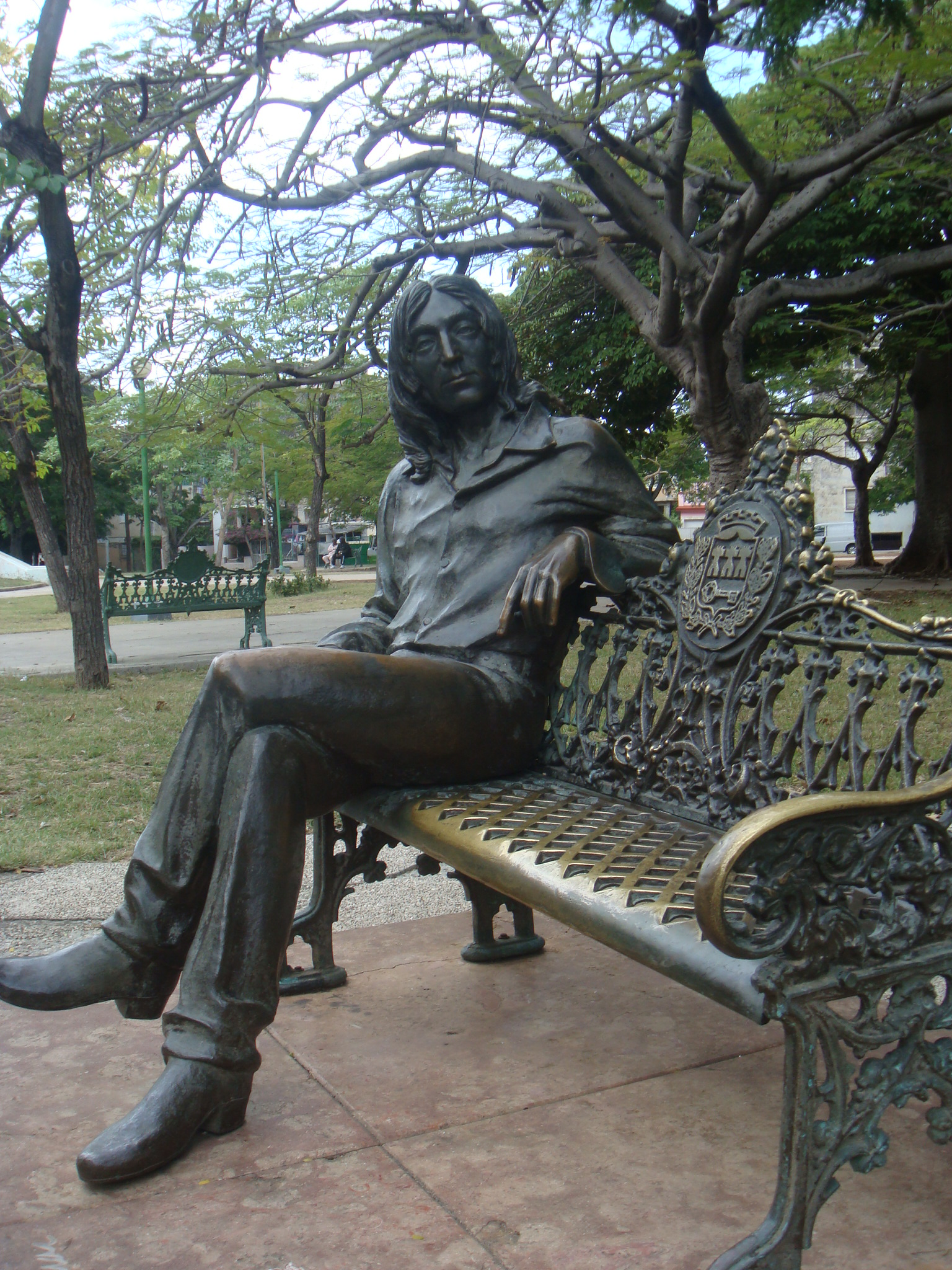 Estatua de John Lennon en el Parque ubicado en 17 entre 6 y 8, en el Vedado, Habana, Cuba.